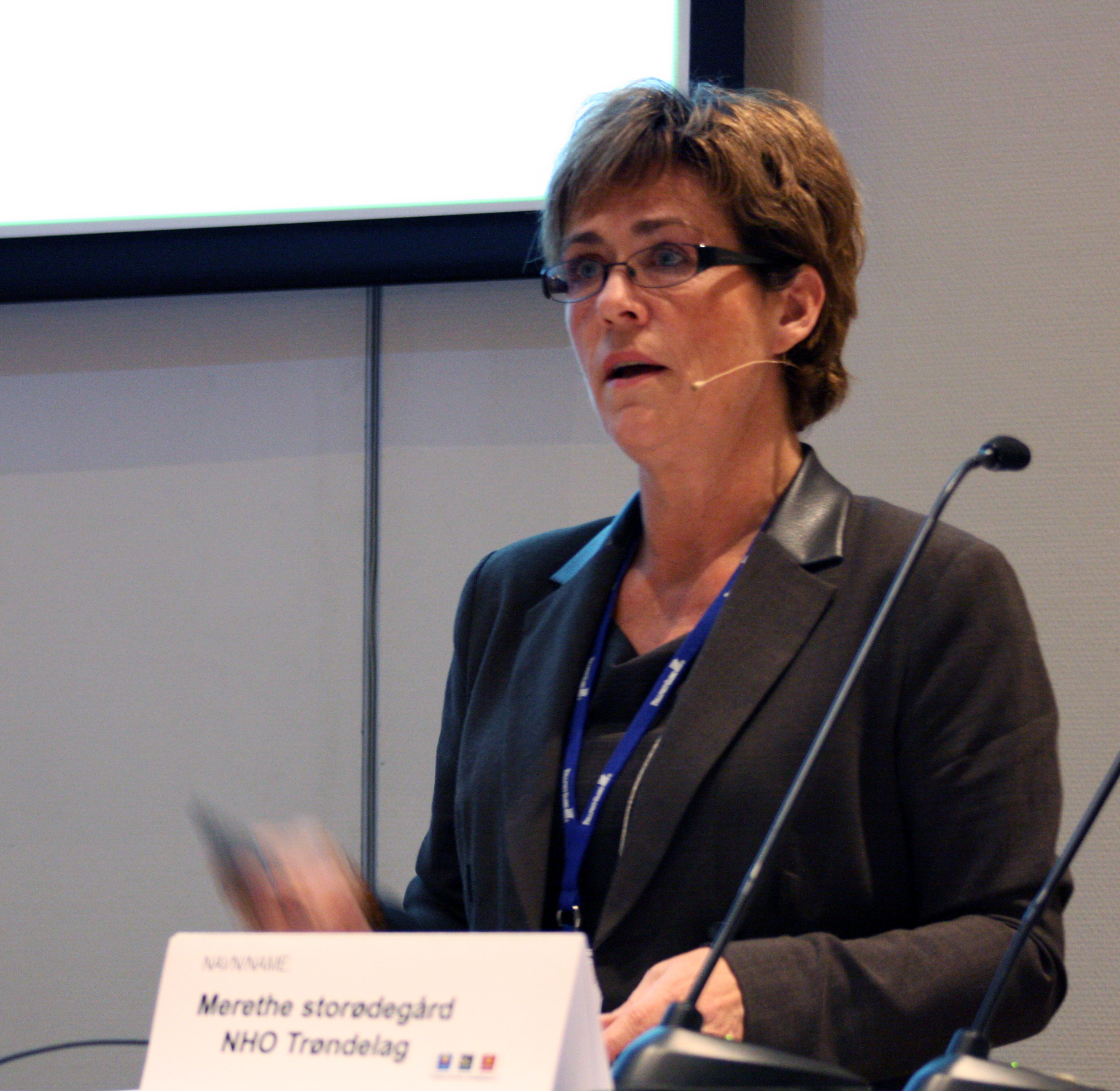 Regiondirektør Merethe Storødegård i NHO Trøndelag.